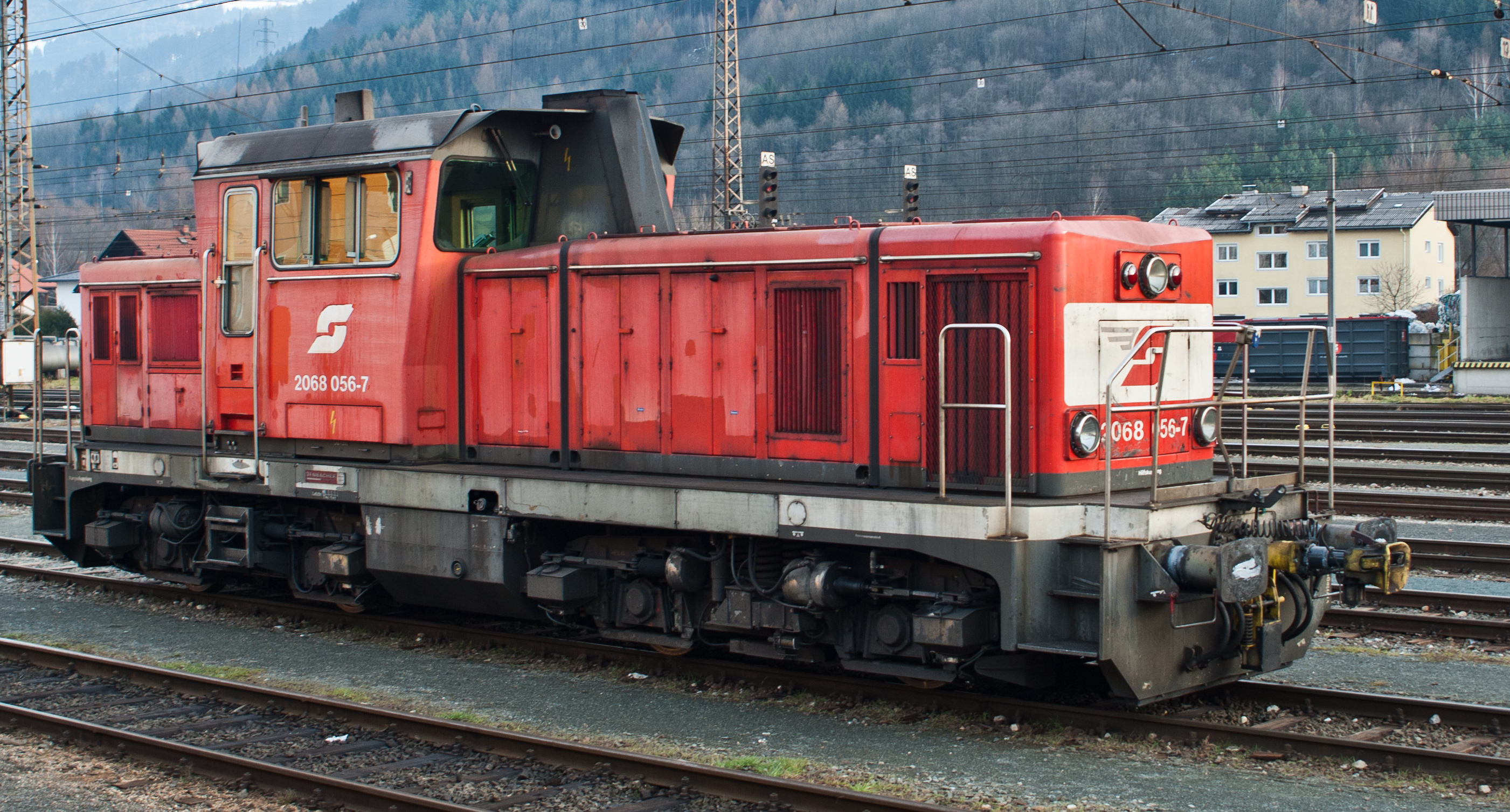 Diesel-Rangierlokomotive ÖBB 2068 056-7 im Bahnhof Hall in Tirol